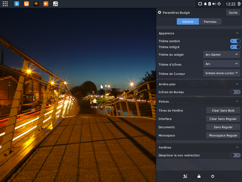 Bureau de Solus 1.2.1